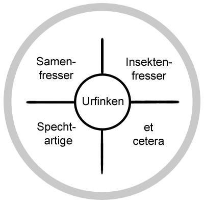 schematisches Beispiel einer adaptiven Radiation